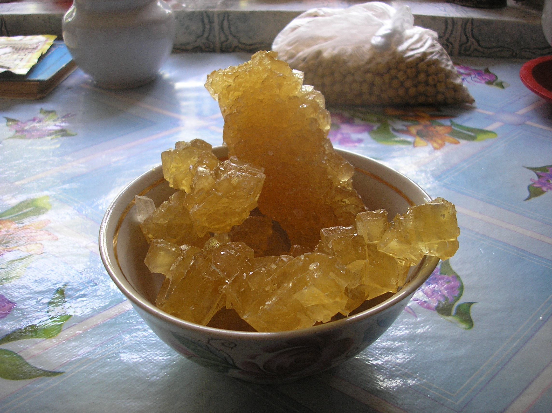 Нават (восточная сладость) Nadab (Eastern sweetness)